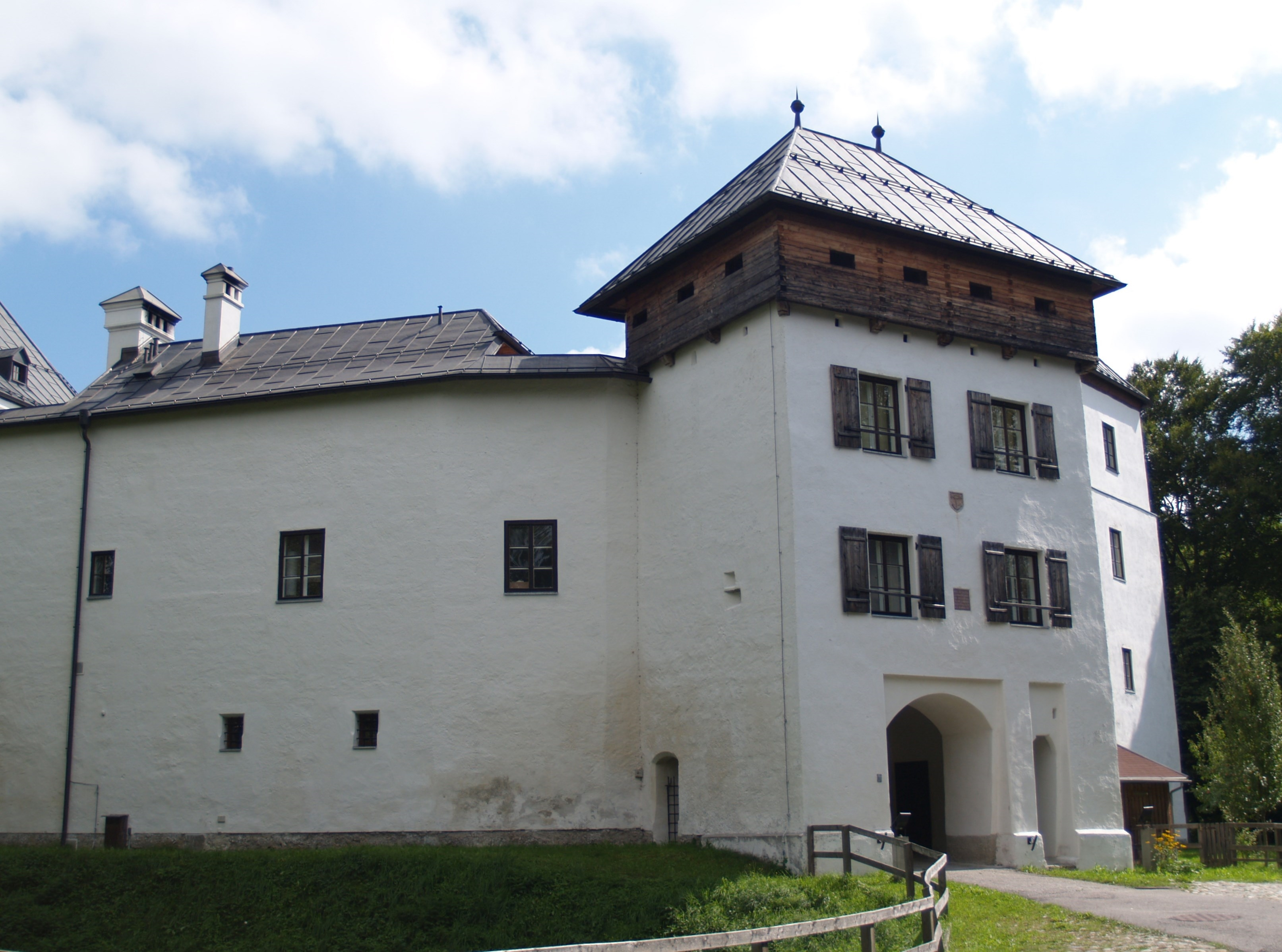 Burg bzw. Schloss Wildshut